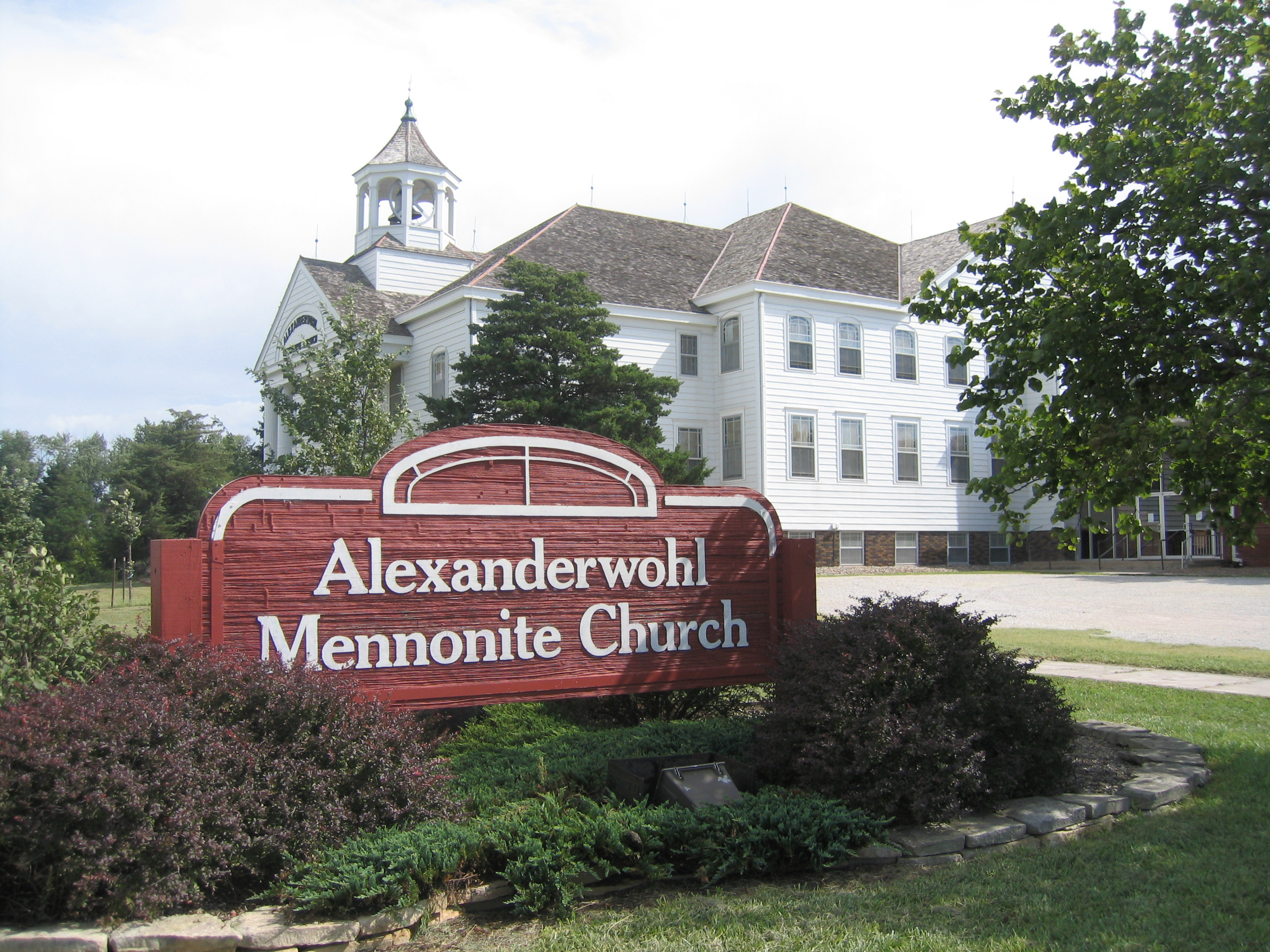 Alexanderwohl Mennonite Church, Goessel, Kansas